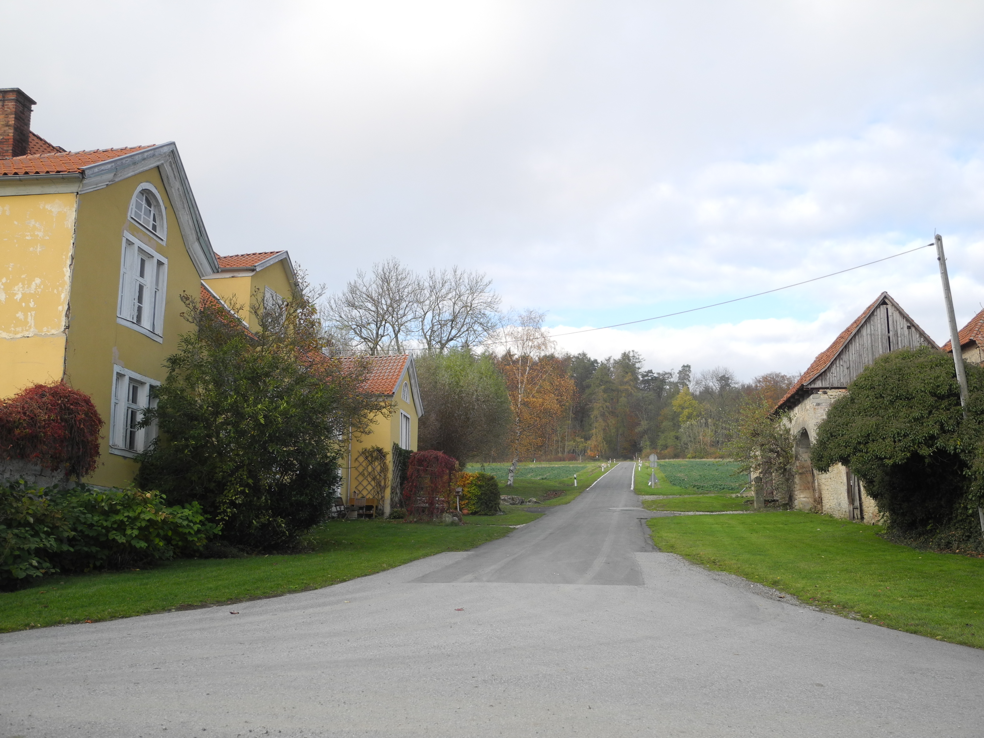 Sieberhausen, heute ein Teil von Zierenberg, Hessen, Deutschland. Links das Herrenhaus; im Hintergrund die bewaldete Höhe Igelsbett.